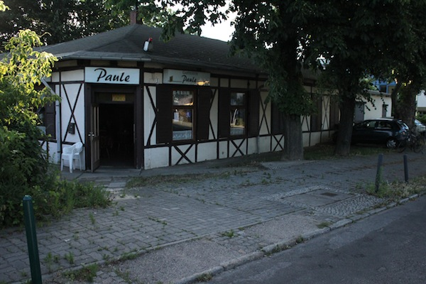 Gaststätte "Paule", Juli 2015, Strassenansicht in Dämmerung mit Anbau im hinteren Teil